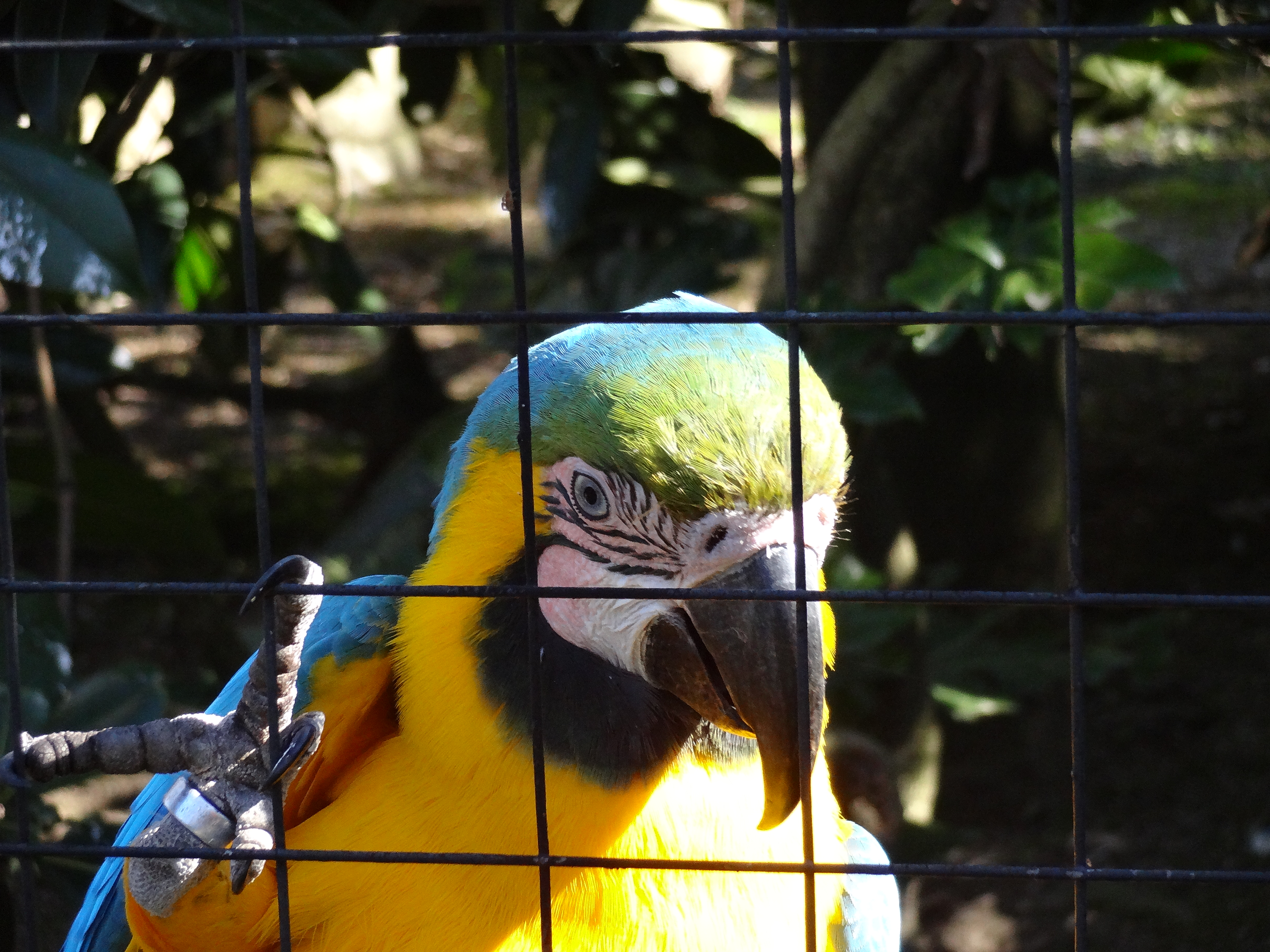 Ara Ararauna Blu